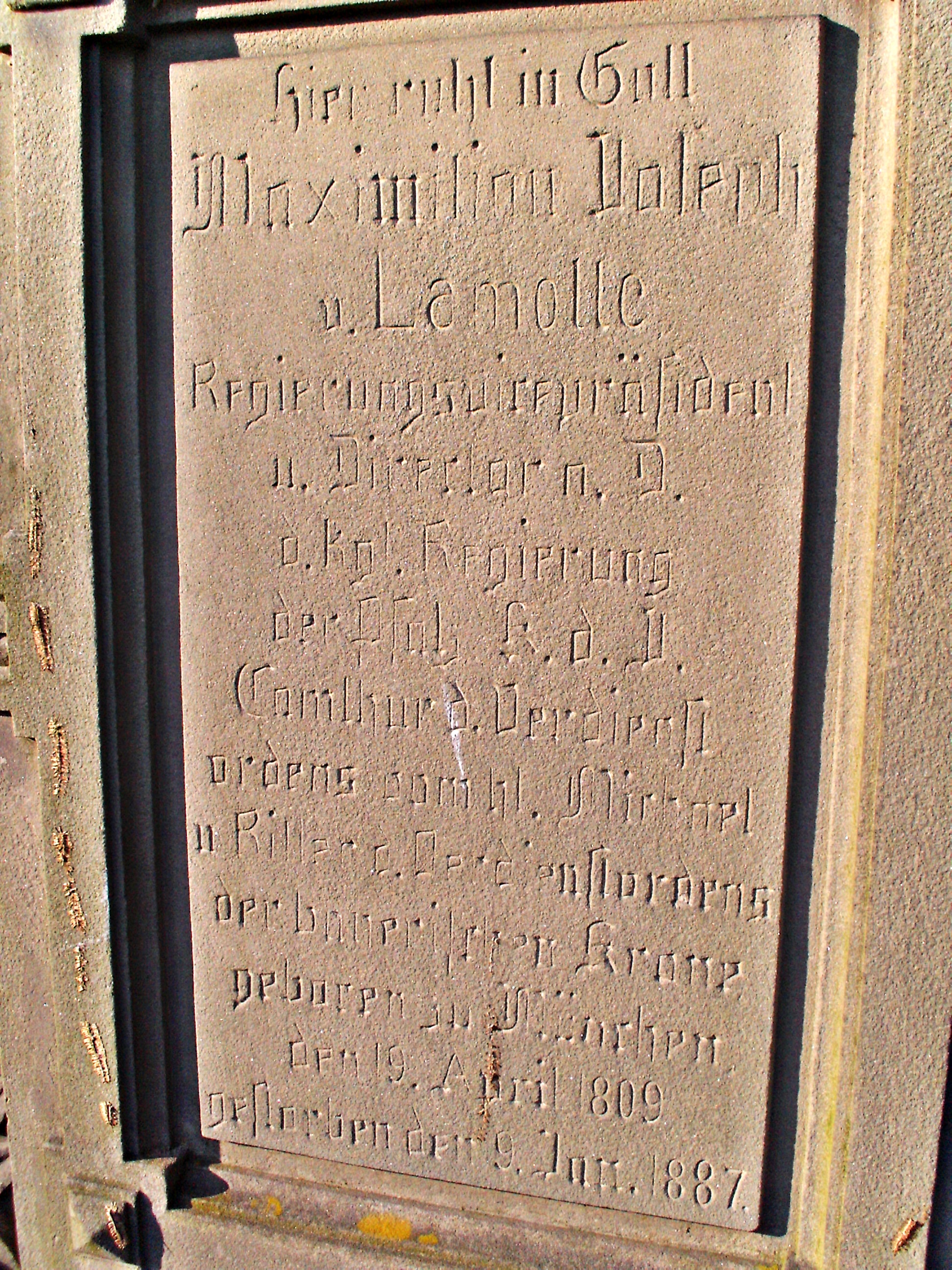 Grabinschrift Maximilian Joseph von Lamotte, Vize-Regierungspräsident der Pfalz, neuer Friedhof Speyer